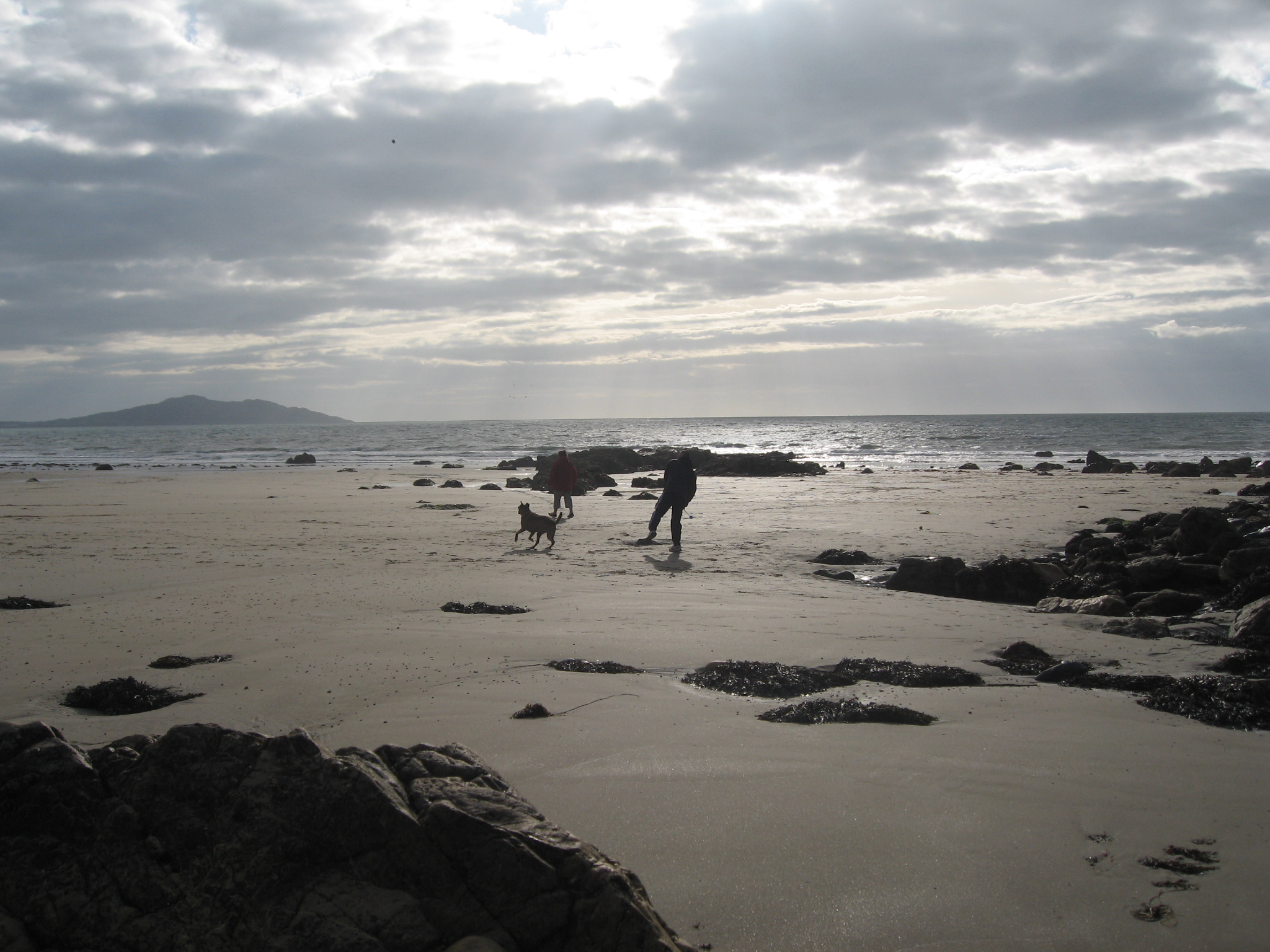 Fetch!